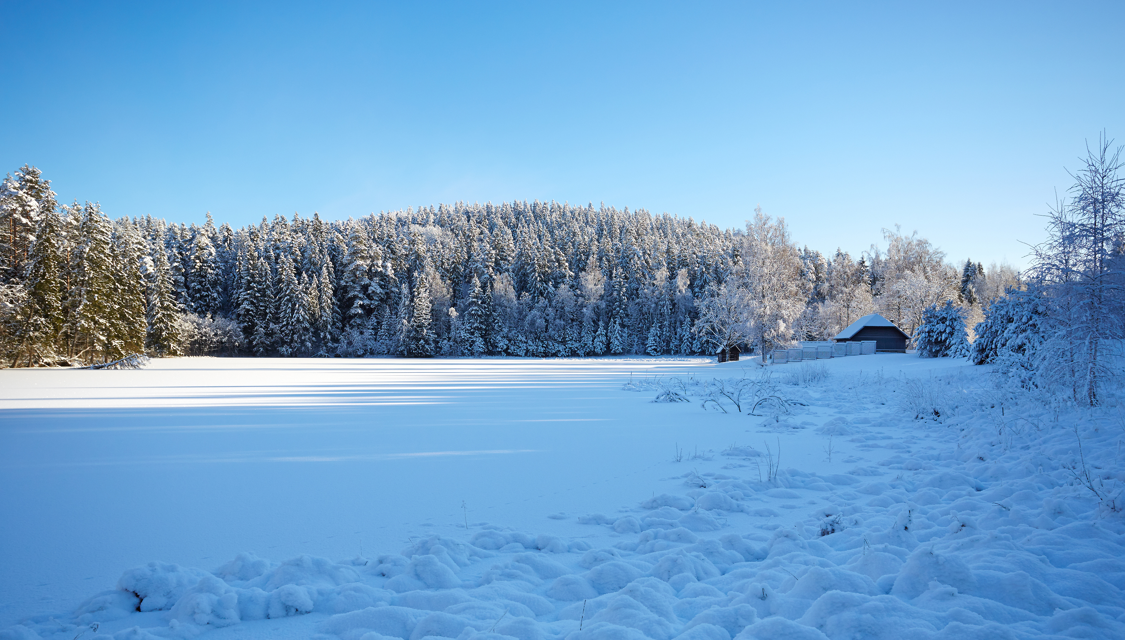 Talvine vaade Vällamäele üle Perajärve.